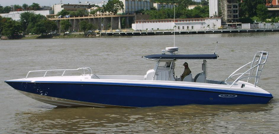 Una de las 4 lanchas rapidas´´´Nor-Tech donadas a la marina de guerra domincana por el comando sur de los estados unidos a traves del programa ´´enduring frienship´´ One of the four interceptor boats donated to the dominican navy by the united states Douthern command- ´´enduring friendship´´ program.